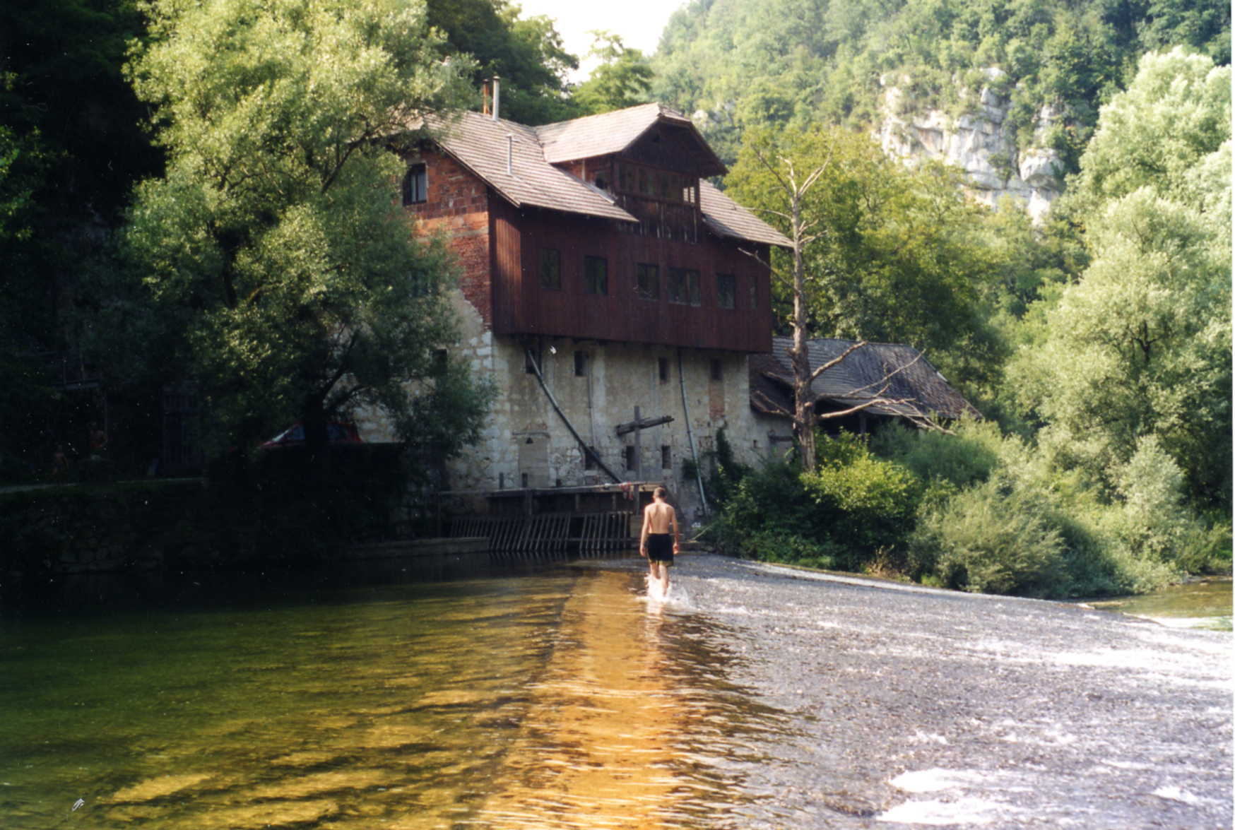 Water mill in Pobrežje at the river Kolpa (Bela krajina, Slovenia)